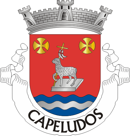 Brasão da freguesia de Capeludos (concelho de Vila Pouca de Aguiar)